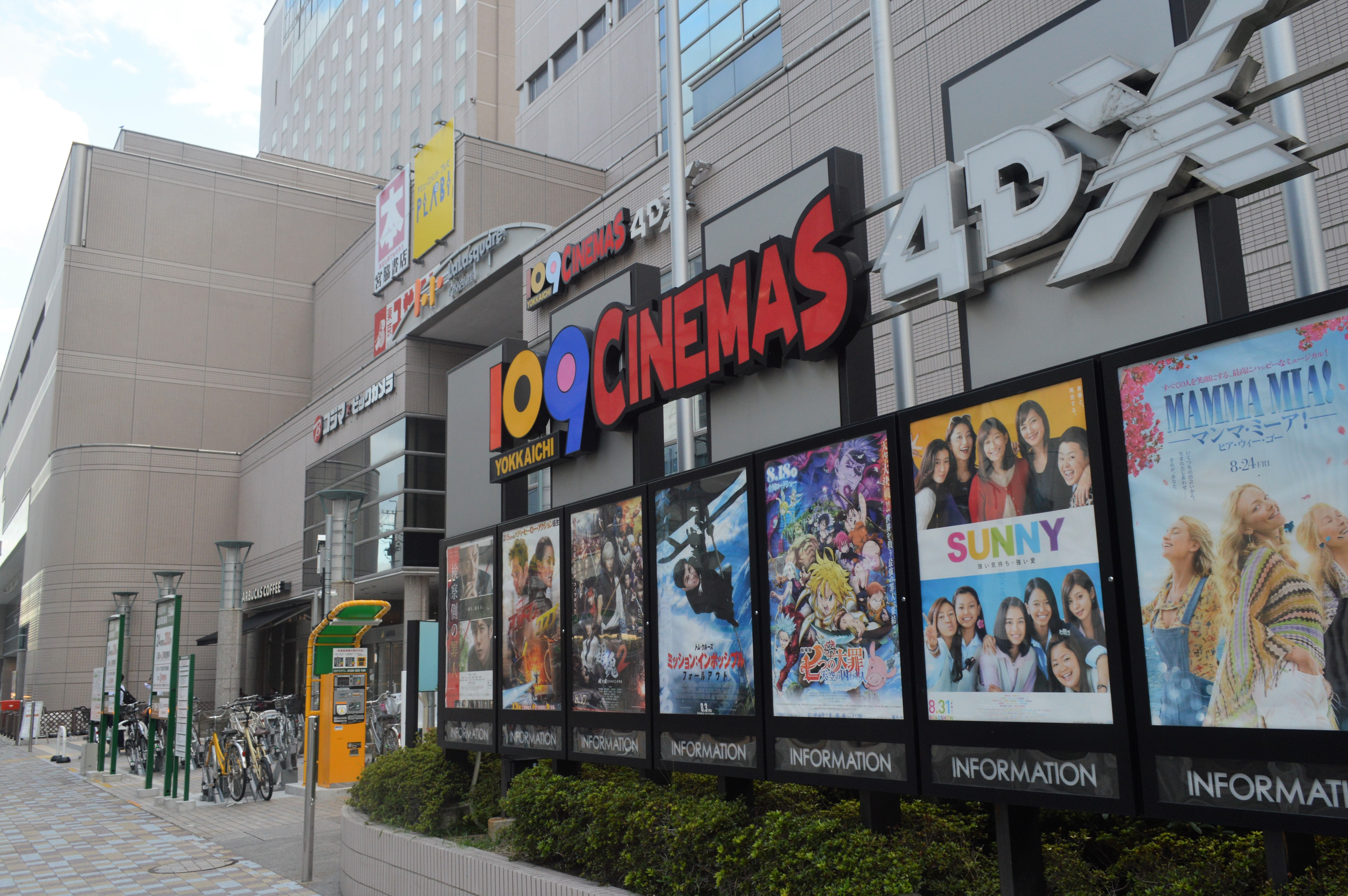 三重県四日市市の近鉄四日市駅前にあるララスクエア四日市。109シネマズ四日市の宣伝看板。